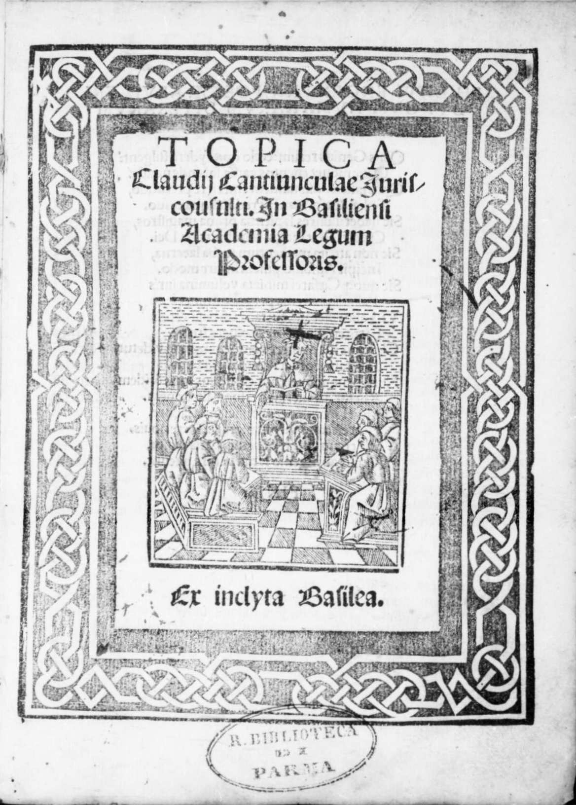 Frontespizio